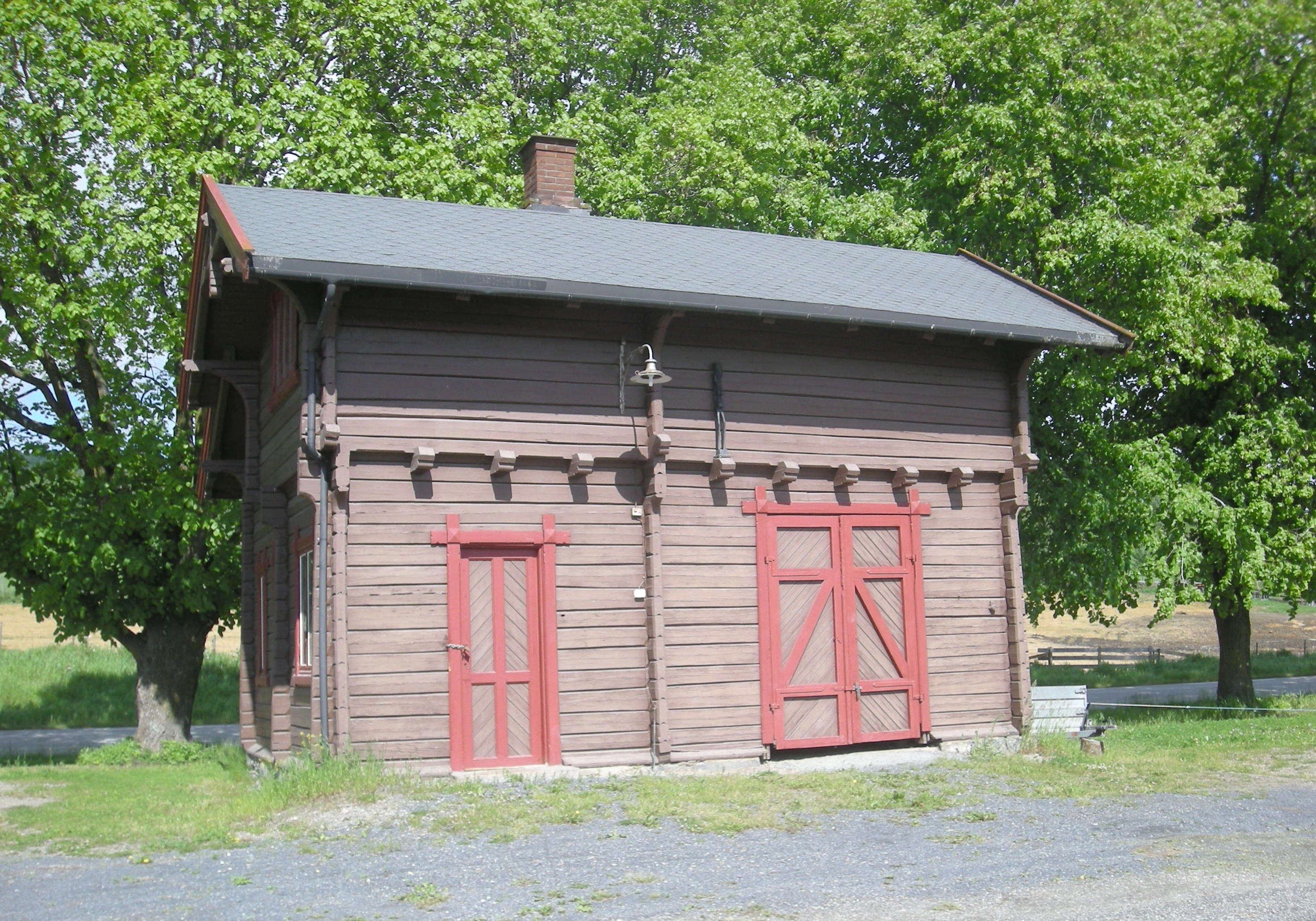 Bryggerhuset i Røykenvika, en gang en del av stasjonsanlegget